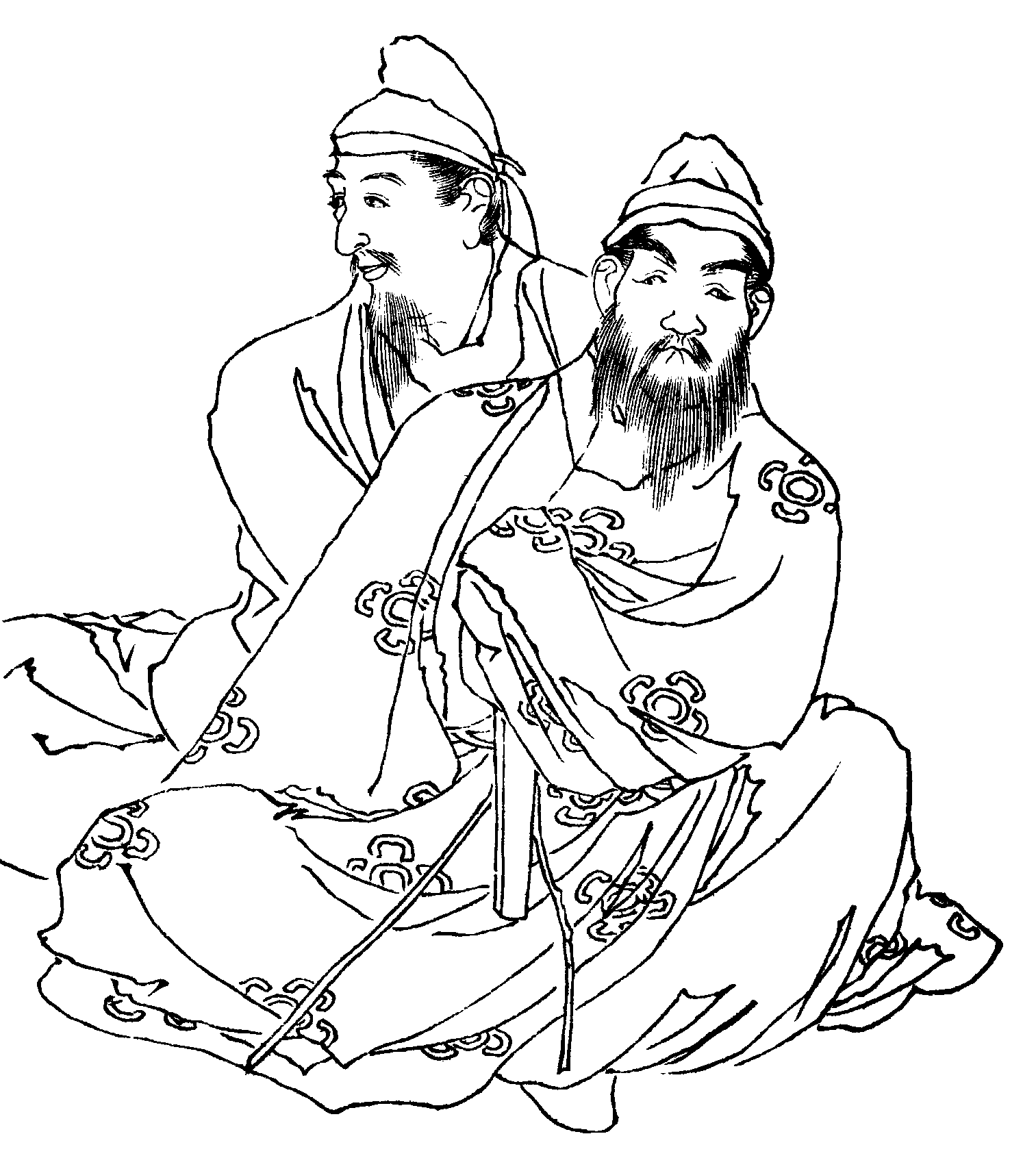 藤原武智麻呂と藤原麻呂